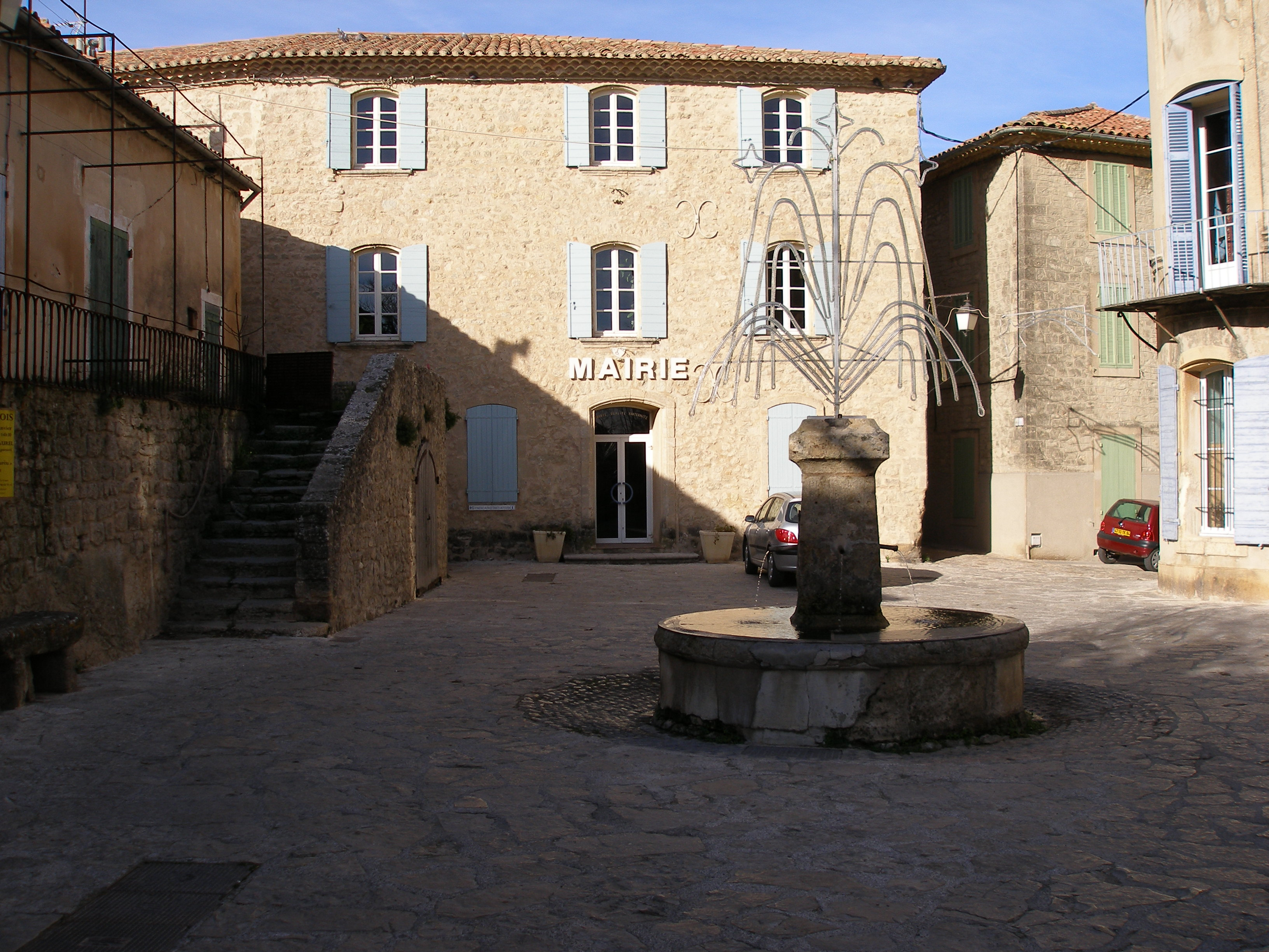 Place de la mairie de Grambois (Vaucluse)